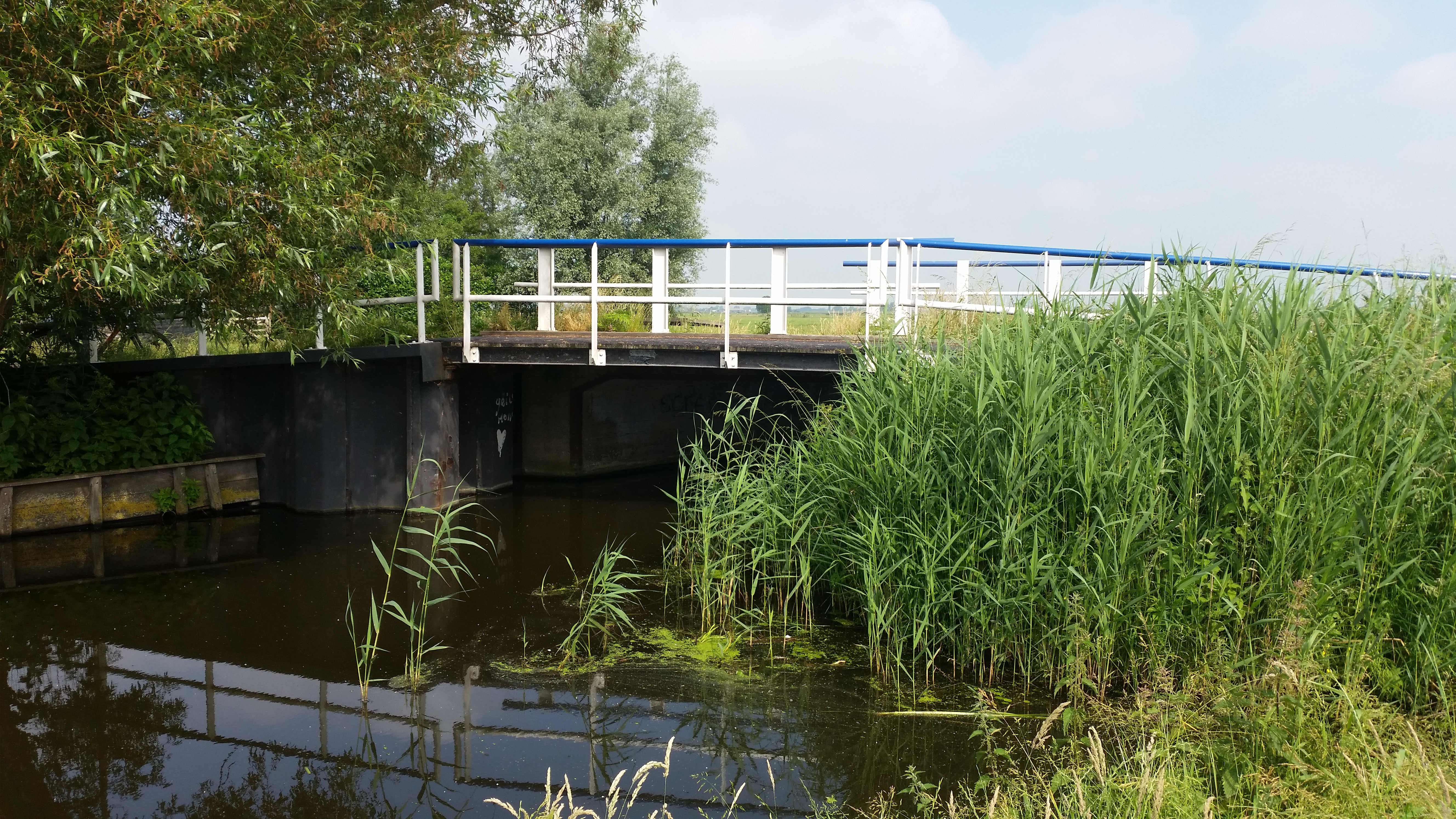 Bruggen 309 (auto's) en 310 (voetgangers/fietsers) in de Bloemendalergouw, Amsterdam-Noord, NB verschil in fundering tussen beide bruggen